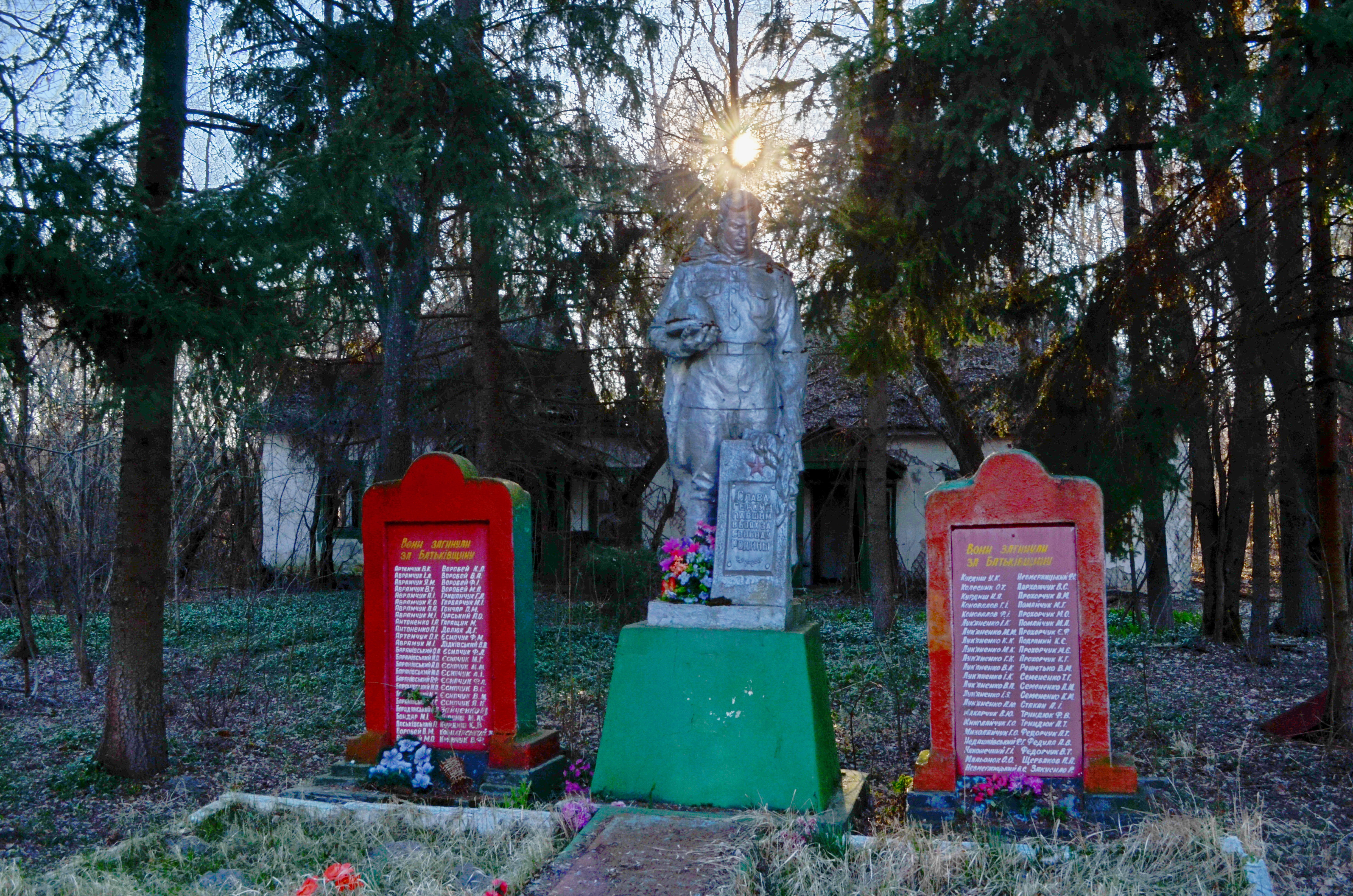 Братська могила радянських воїнів та пам'ятник воїнам-односельцям. Кількість похованих невідома., Народицький район, с. Великі Кліщі, Великокліщівська с/р, біля клубу (виселене.)